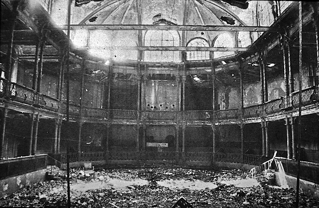 Kurhaus Augsburg-Goeggingen 1972